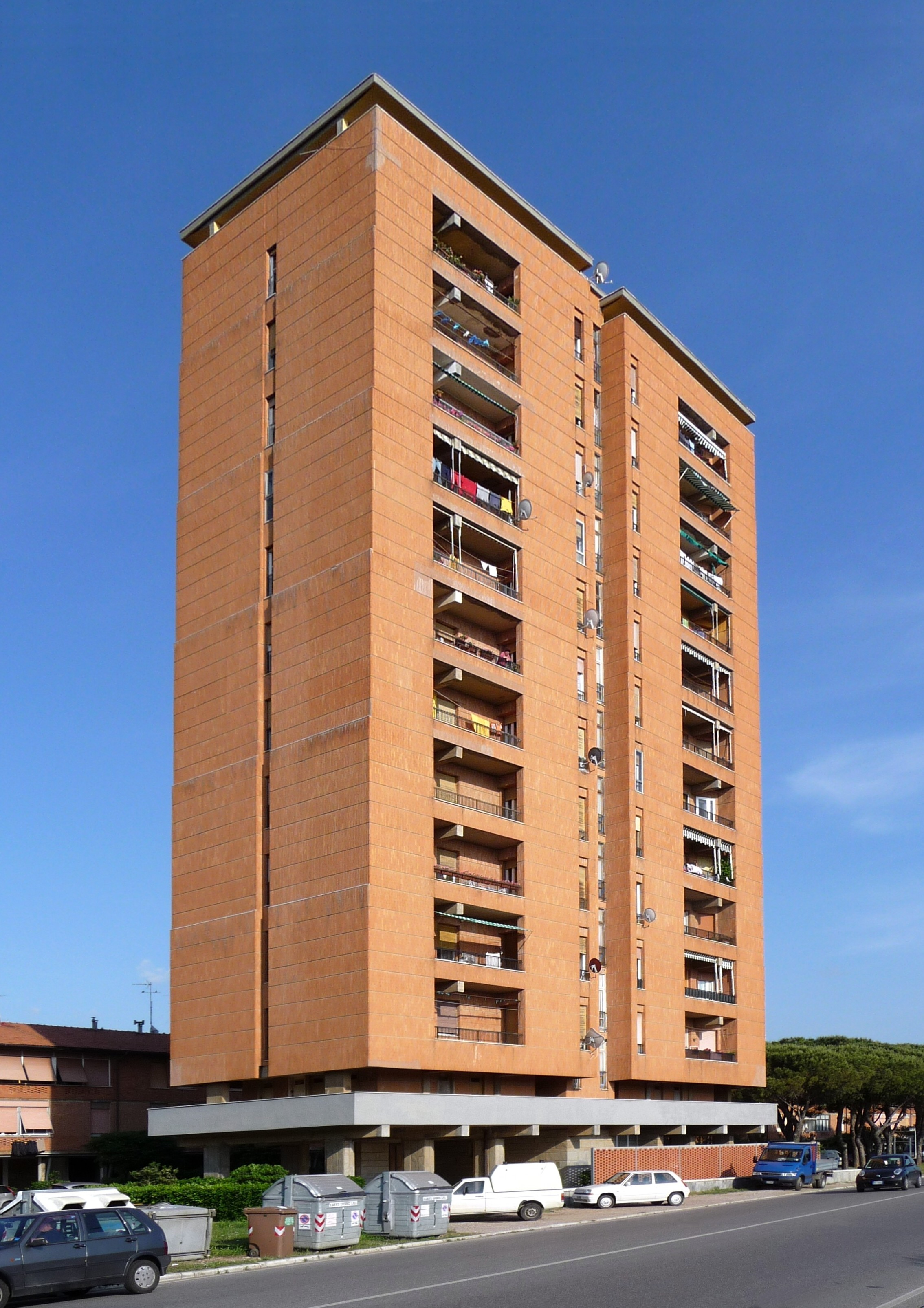 Building in La Rosa, Livorno, Italy